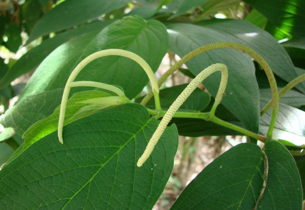 Piper aduncum - PIPERACEAE - Parque Vivencial II - Lago Norte - Distrito Federal - Brasil.